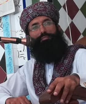 رفاقت علی حقانی